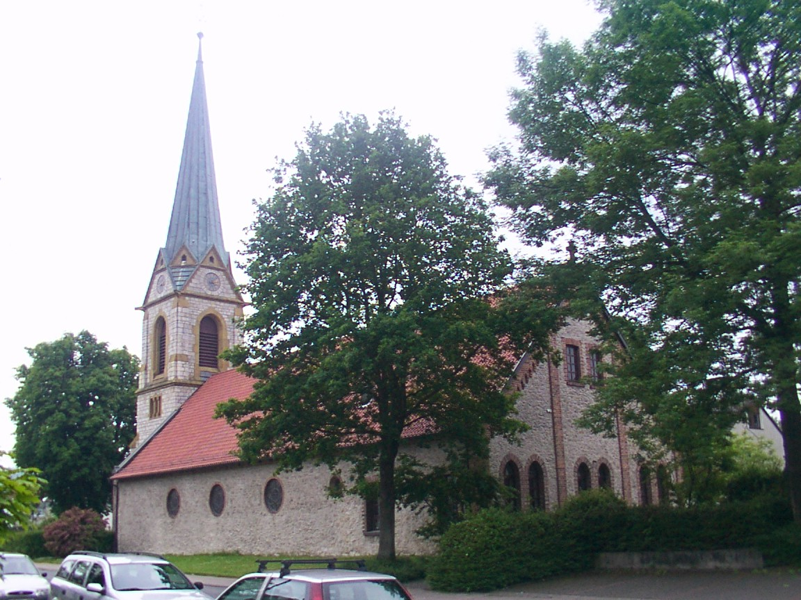 Bielefeld: evangelisch-lutherische Pfarrkirche Stieghorst. Reichenberger Straẞe 1